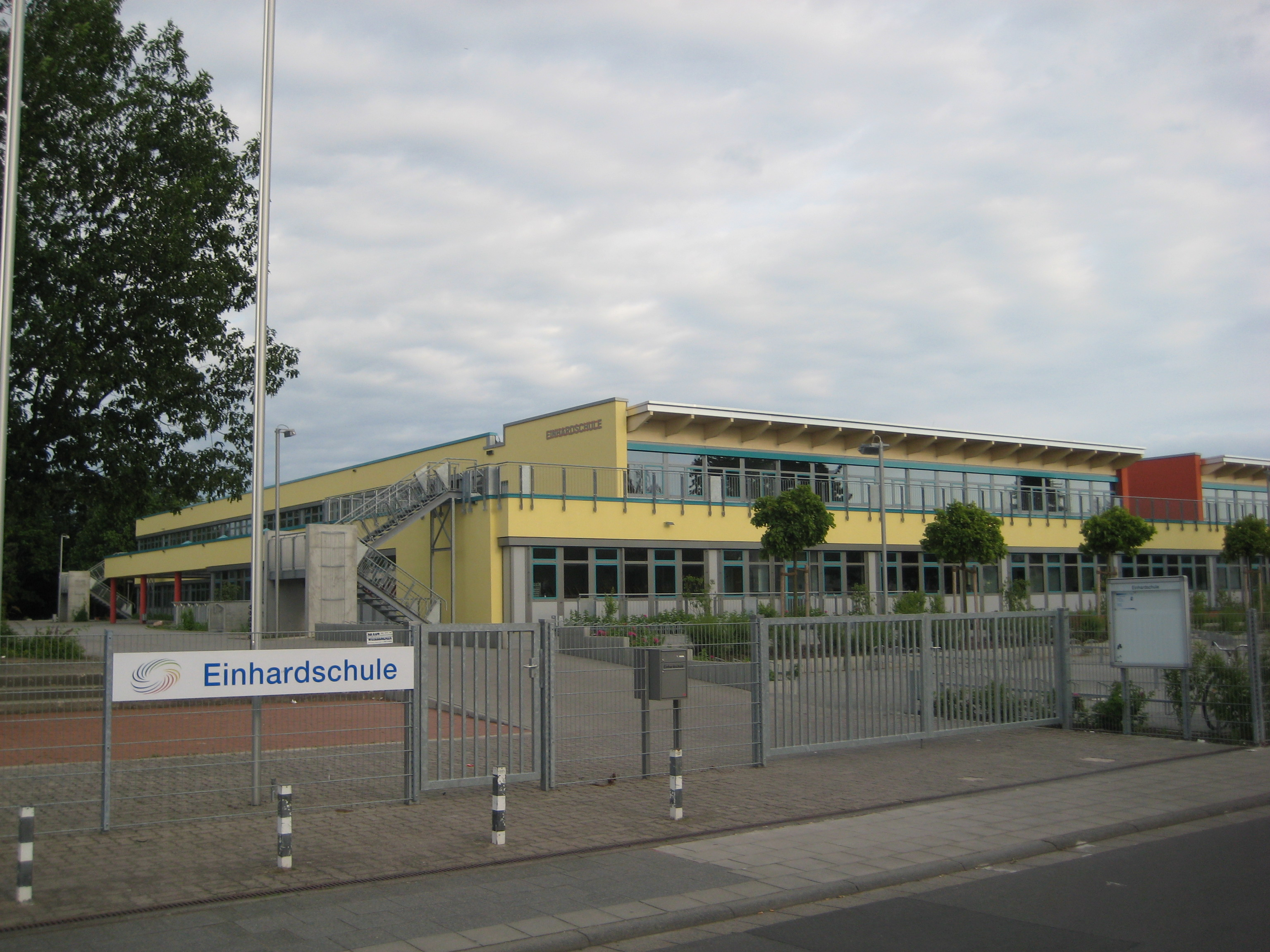 Haupteingang auf das Gelände der Einhardschule Seligenstadt